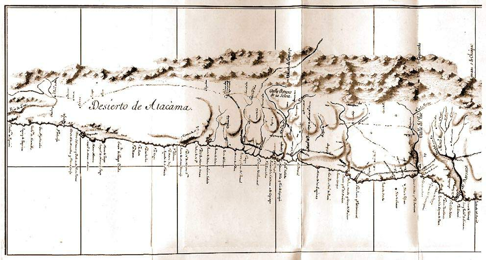 Acercamiento a la zona del Desierto de Atacama del Plano General del Reyno de Chile en la América Meridional